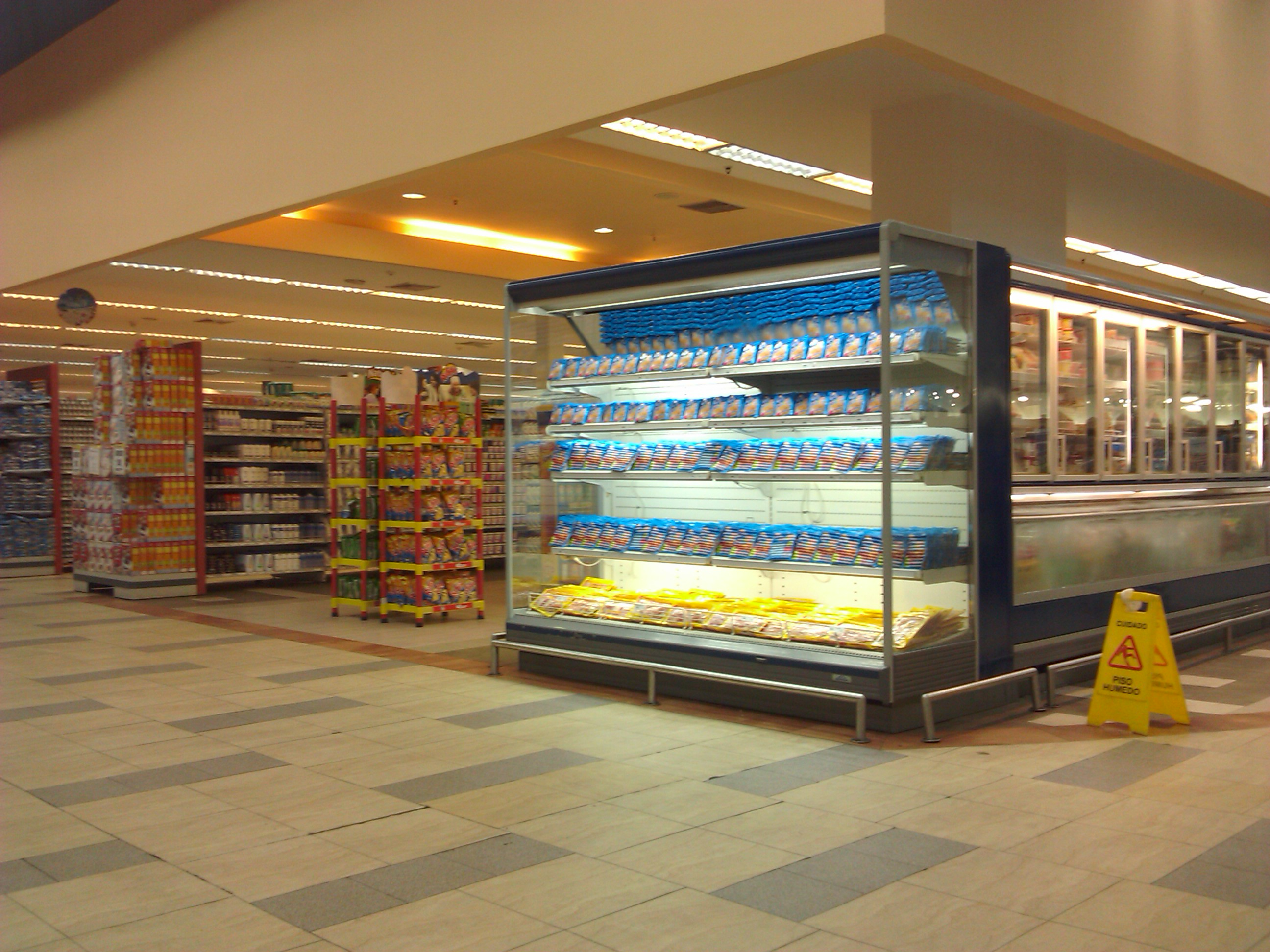 Neveras del supermercado UNICASA en el Centro Comercial La Cascada, Maturín, Estado Monagas, Venezuela.